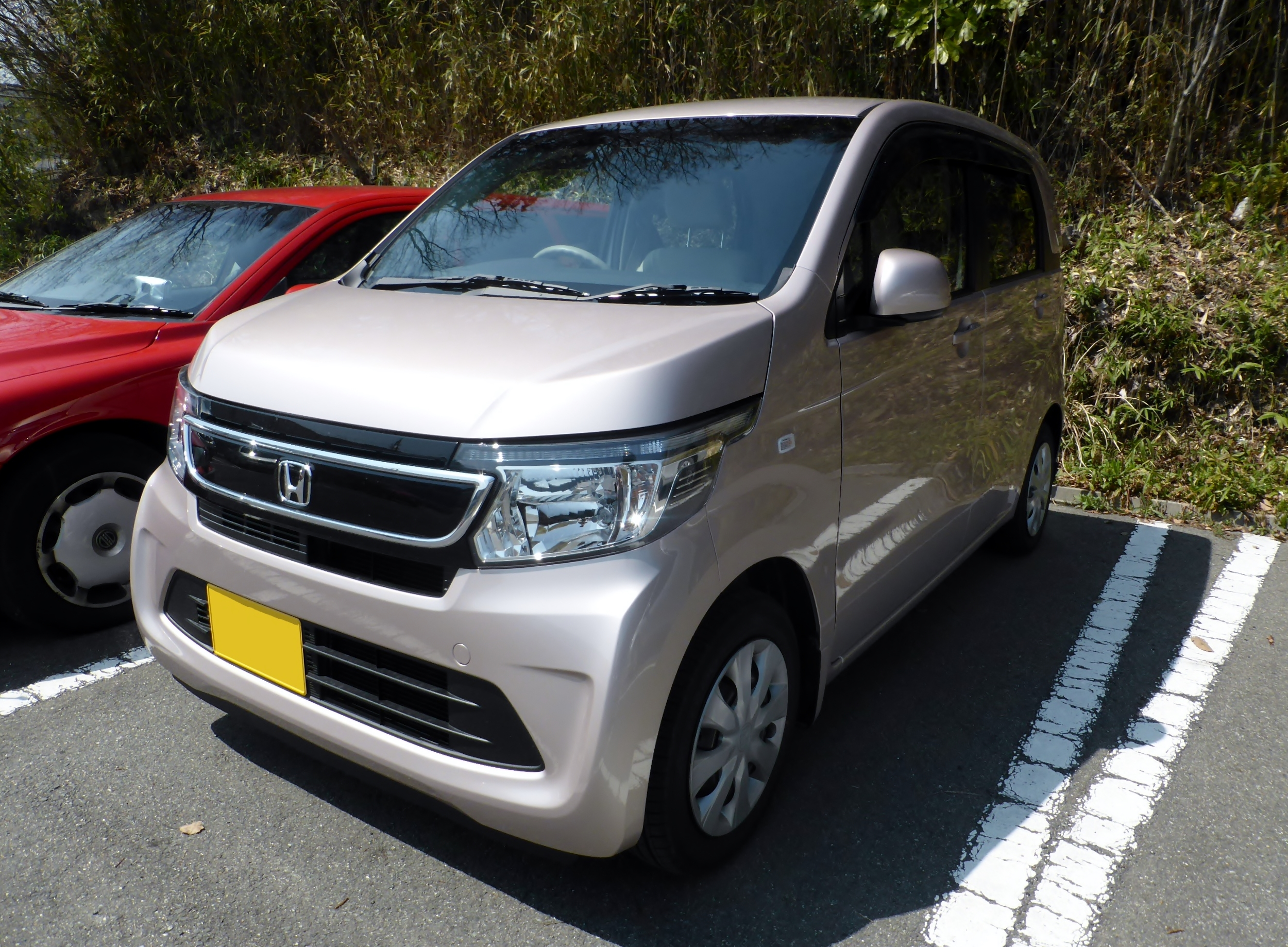 JH1型ホンダ・N-WGN Gをフロントから撮影。